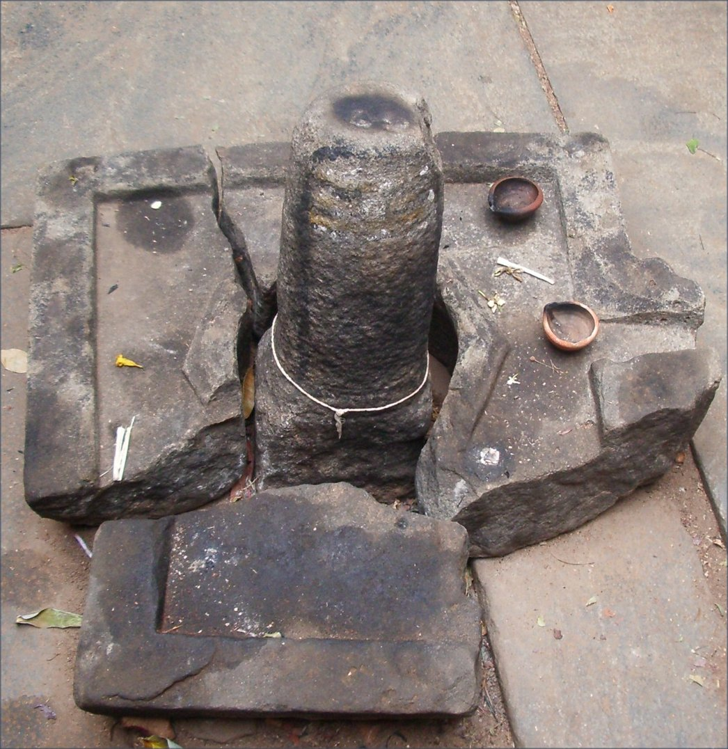 Objecte de culte fàlic a Polonnaruwa, foto feta per J. Ollé el juliol del 2006